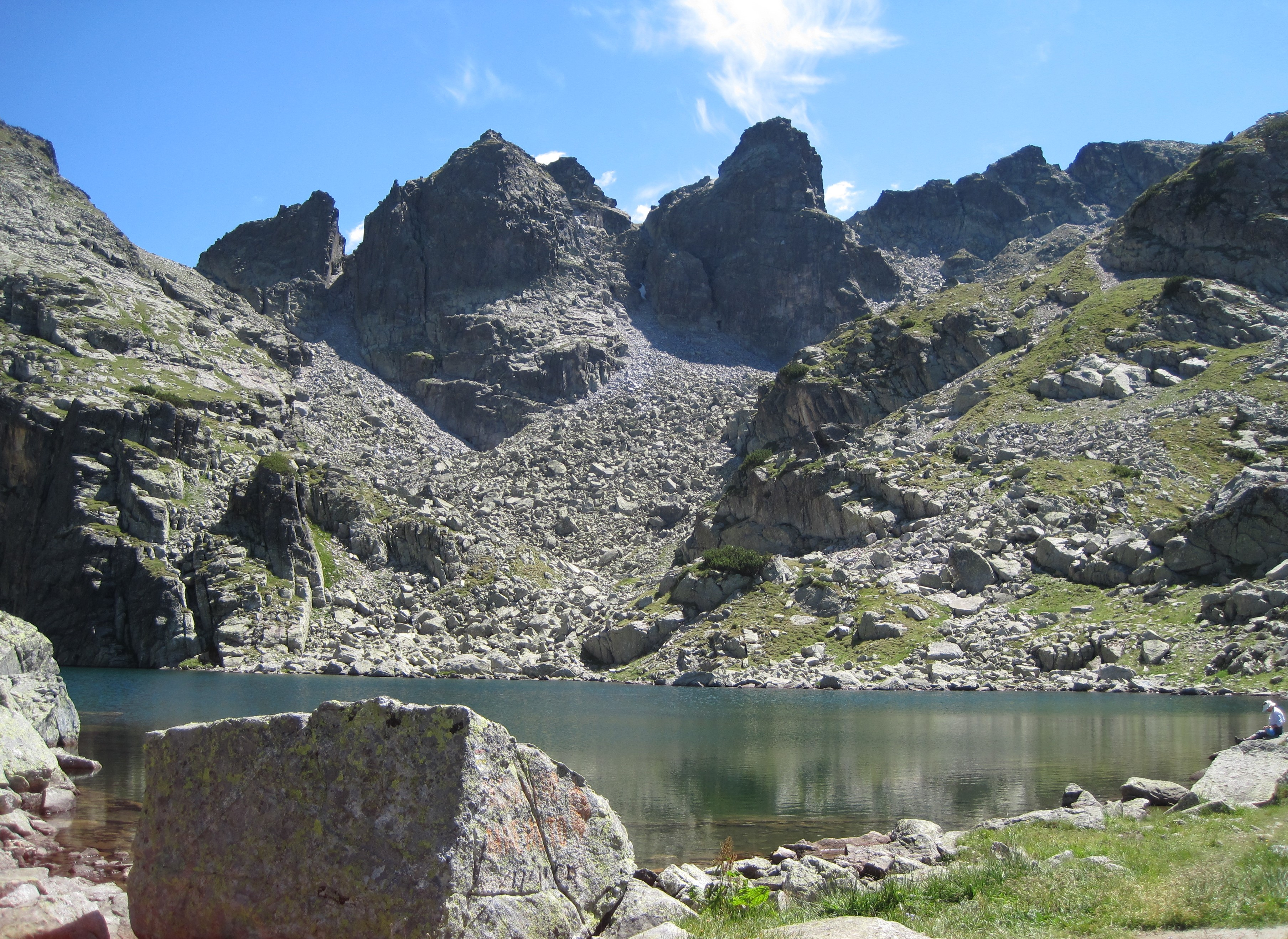 Купените: (отляво надясно) Безименният, Малкият, Средният и Големият, над Страшното езеро